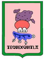 Stemma EL CARMEN TEQUEXQUITLA Tlaxcala